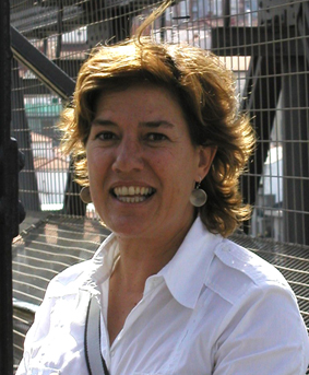 Carmen Espegel en visita puente colgante de Portugalete (España)